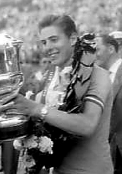 Finish Olympia Tour in Olympisch stadion te Amsterdam. Burgemeester van Hall overhandigt winnaar Ab van Egmond de beker